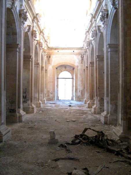 Claudio Zisa, navata centrale di san matteo